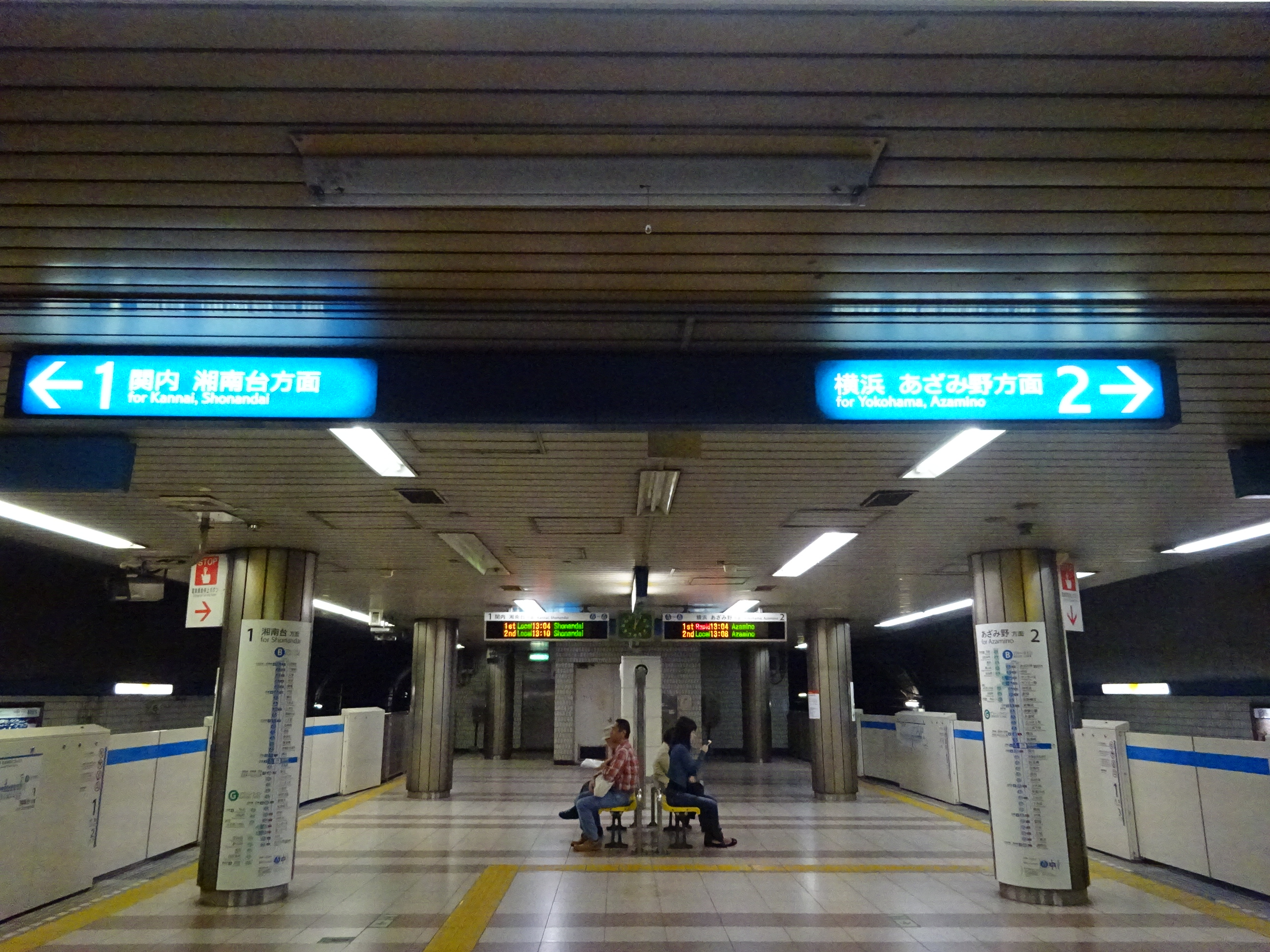 市営地下鉄桜木町駅ホーム